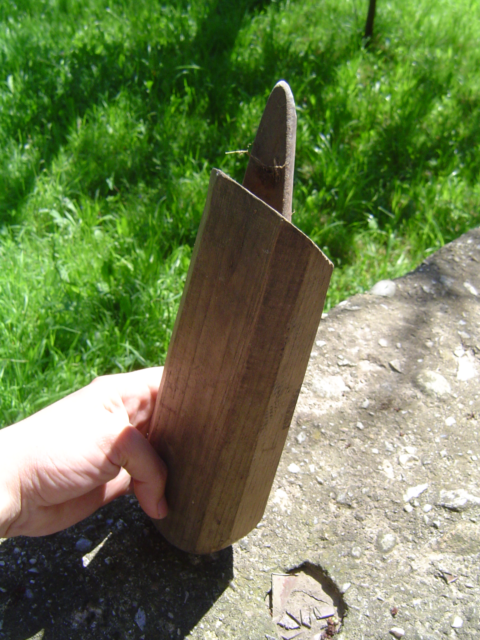 Cachapu, cola piedra d'afilar dientru.